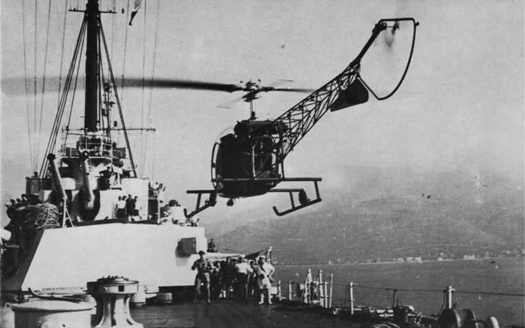 Golfo di Gaeta, 5 Luglio 1953: il primo appontaggio di un elicottero Bell 47G sul ponte di coperta dell'incrociatore Giuseppe Garibaldi